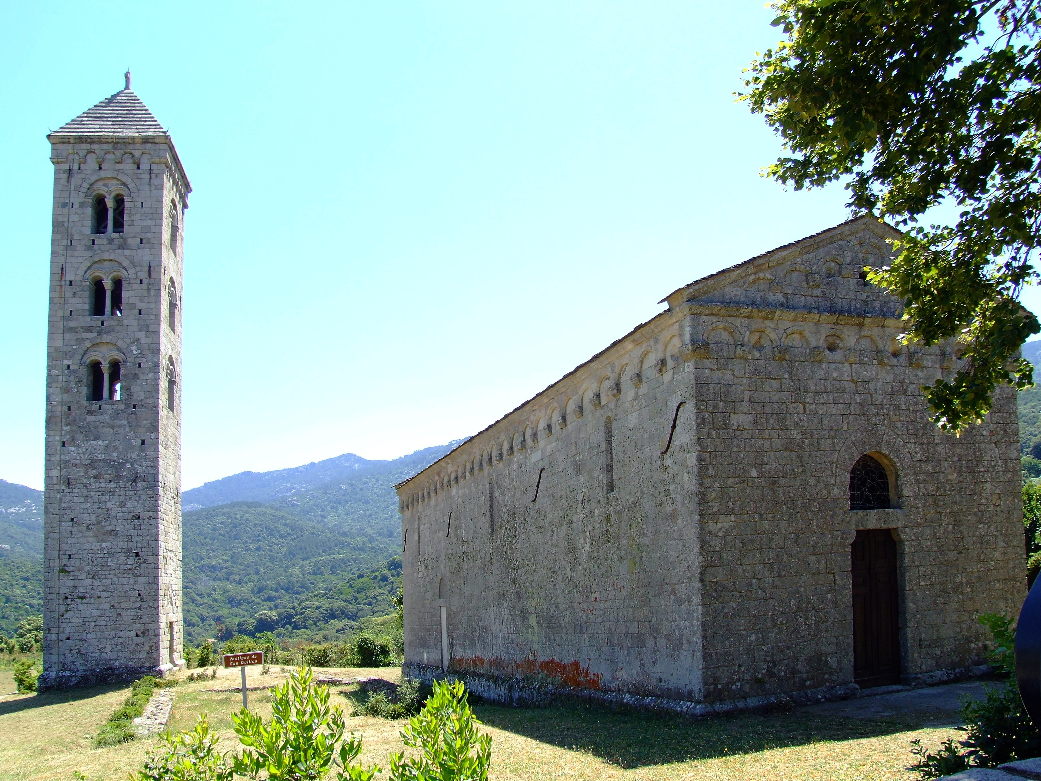 Église et campanile San Giovanni à Carbini